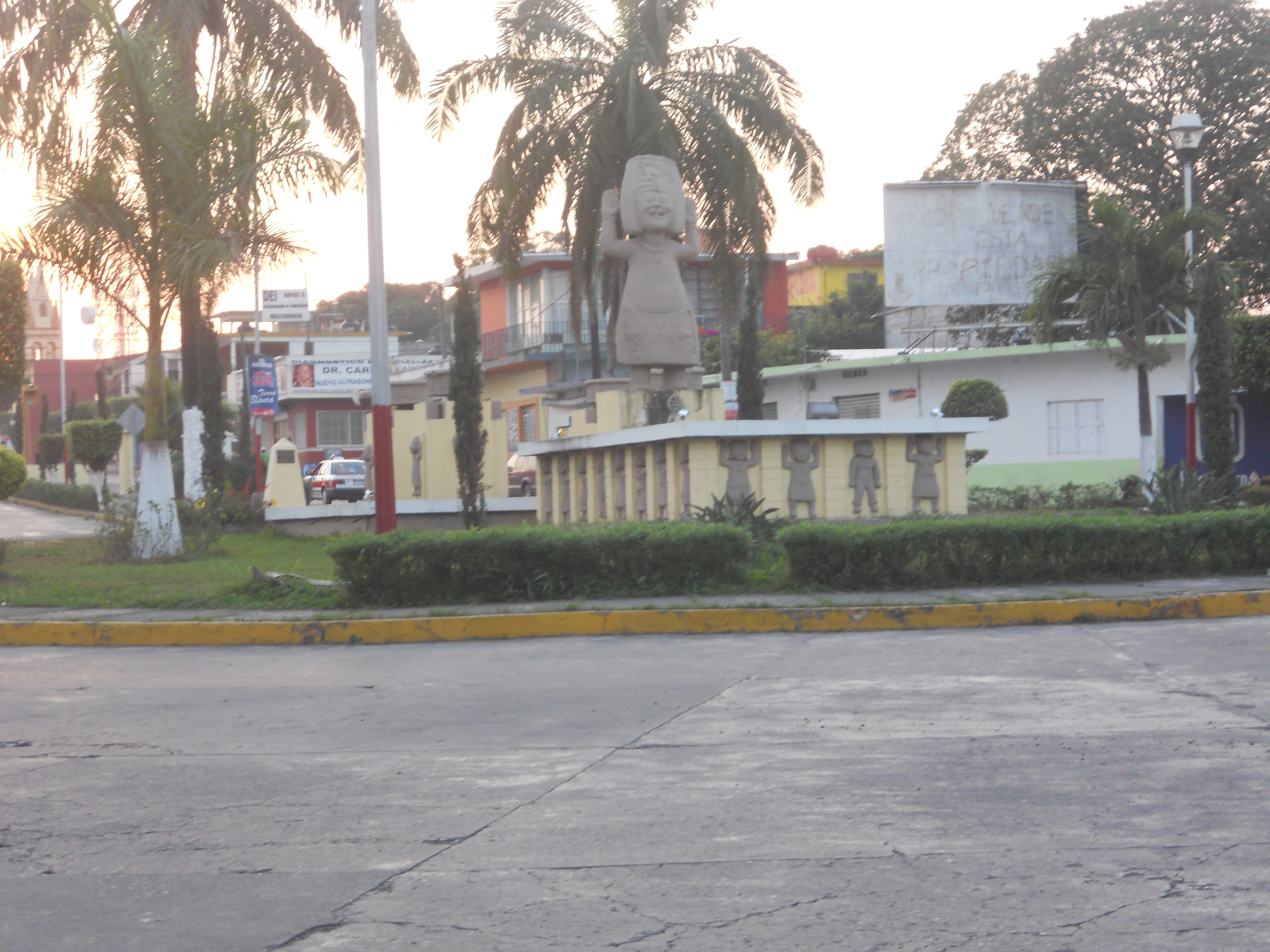 Toma lateral de la rotonda de las caritas sonrientes en Tierra Blanca, Ver. Atardeciendo T_T